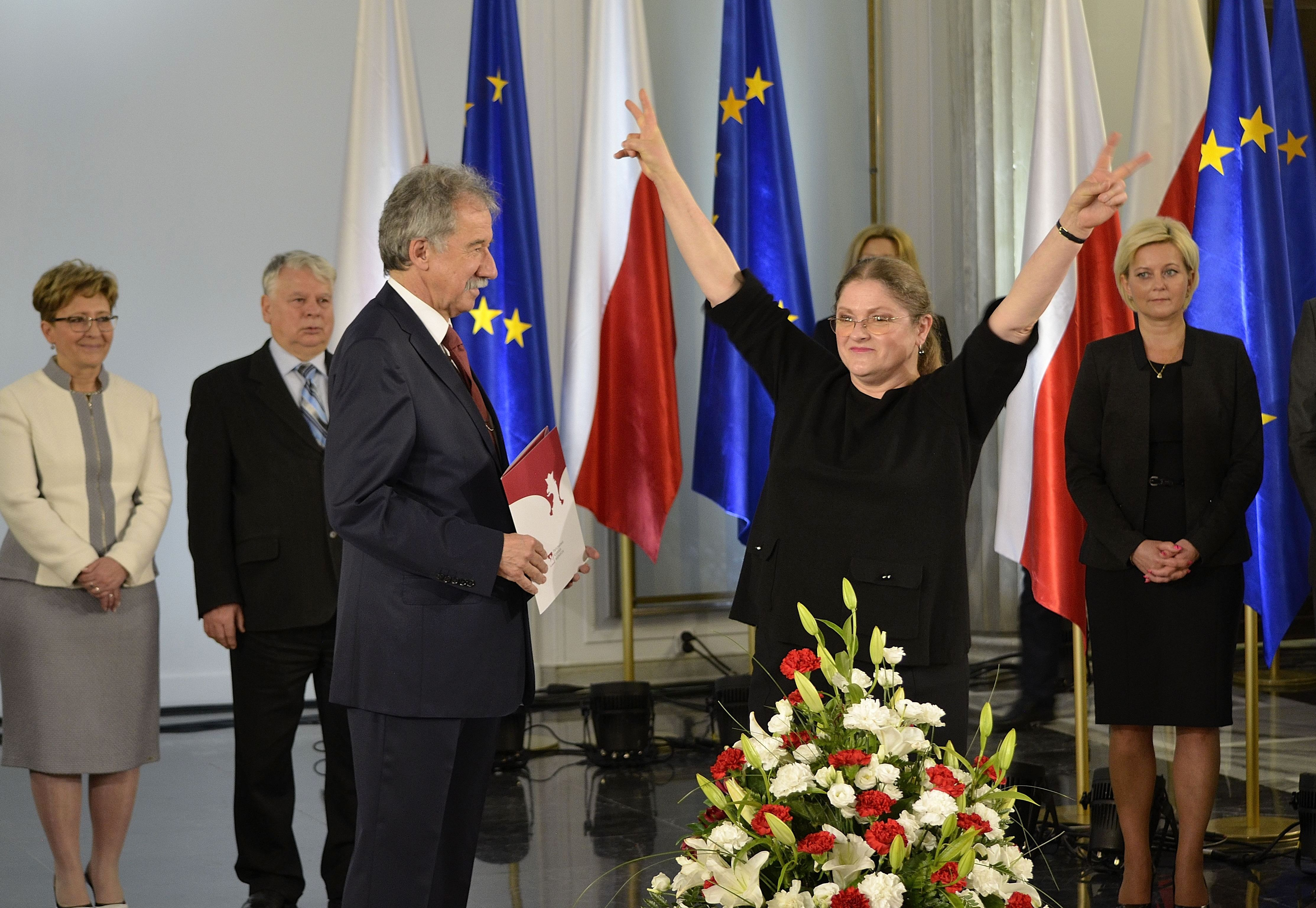 Posłanka Krystyna Pawłowicz podczas uroczystości wręczenia zaświadczeń o wyborze nowo wybranym posłom w Sali Kolumnowej Sejmu